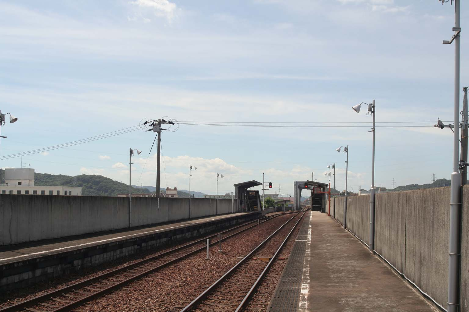 水島臨海鉄道 水島本線 西富井駅の構内